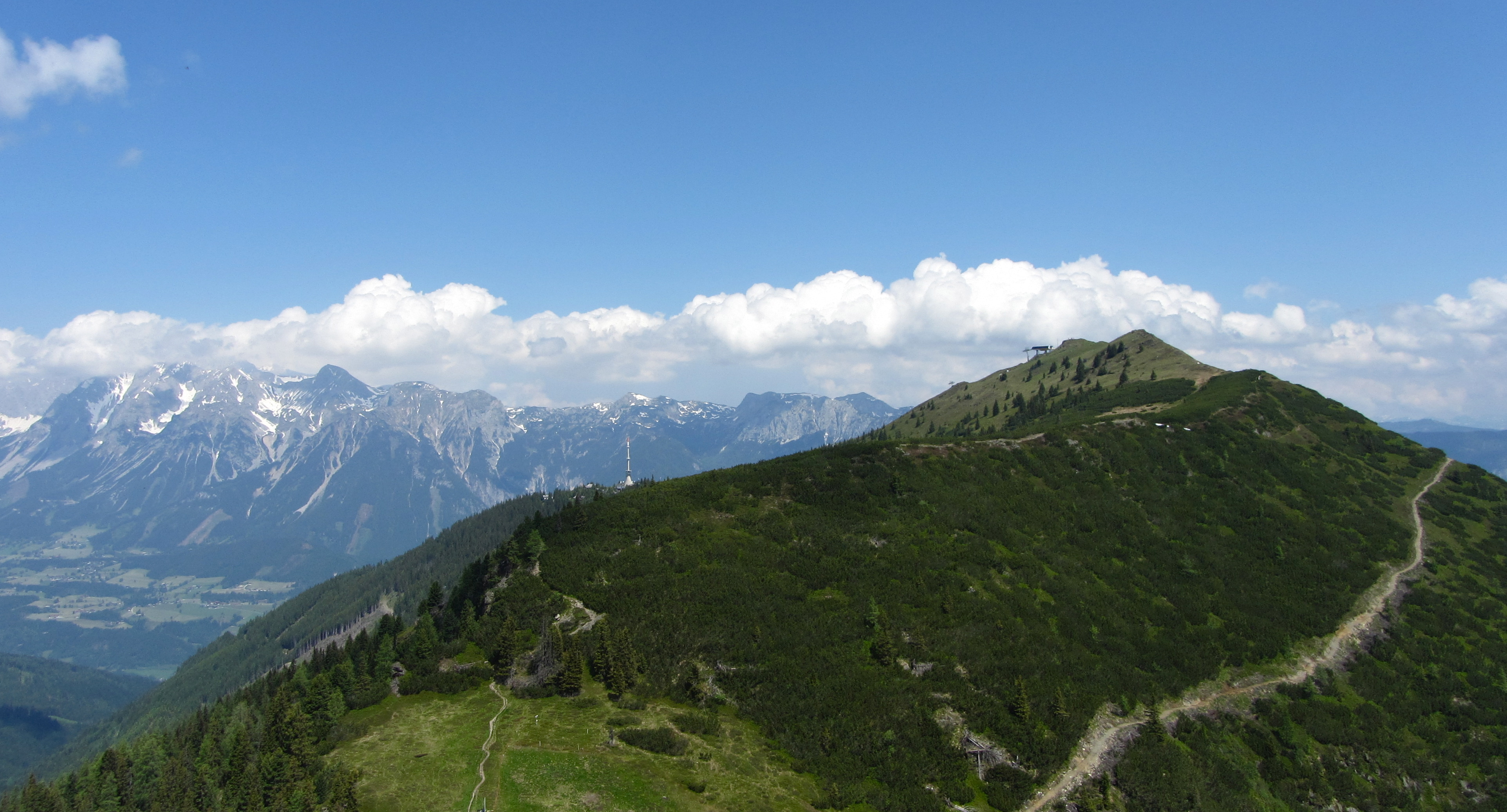 Der Hauser Kaibling bei Haus im Ennstal (Steiermark), im Hintergrund das Dachsteinmassiv